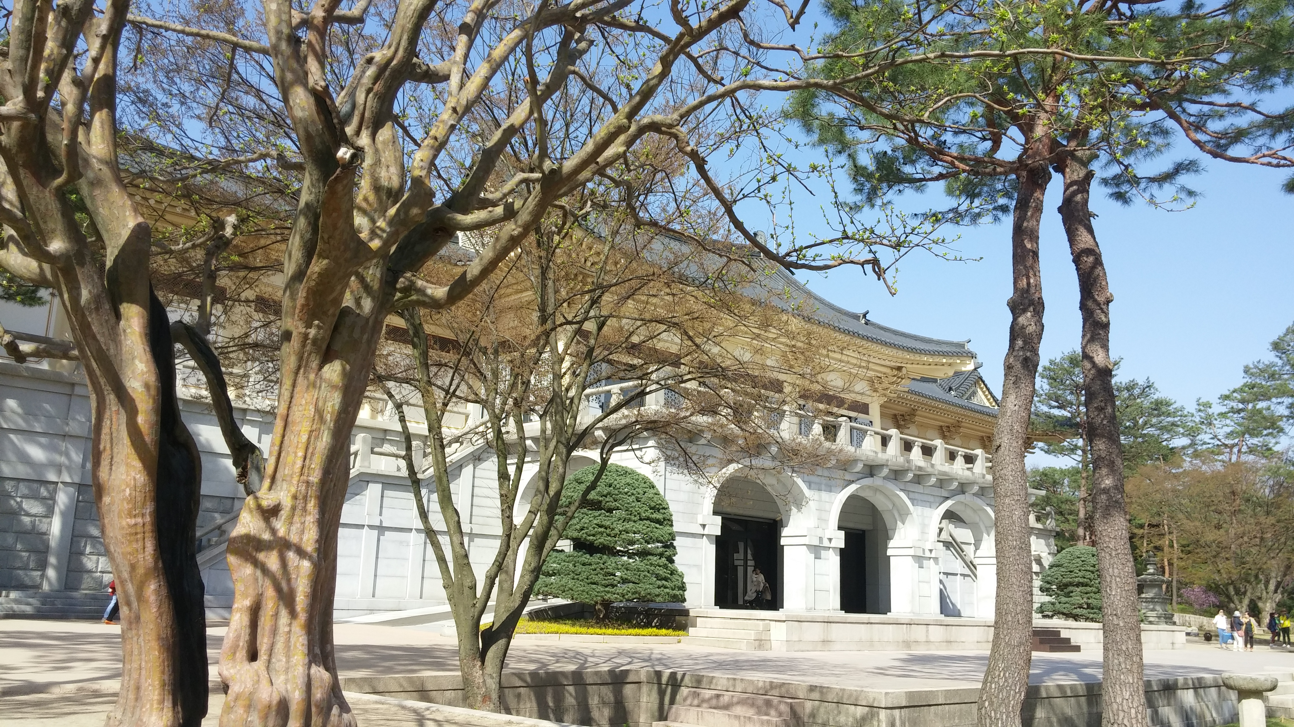 호암 미술관